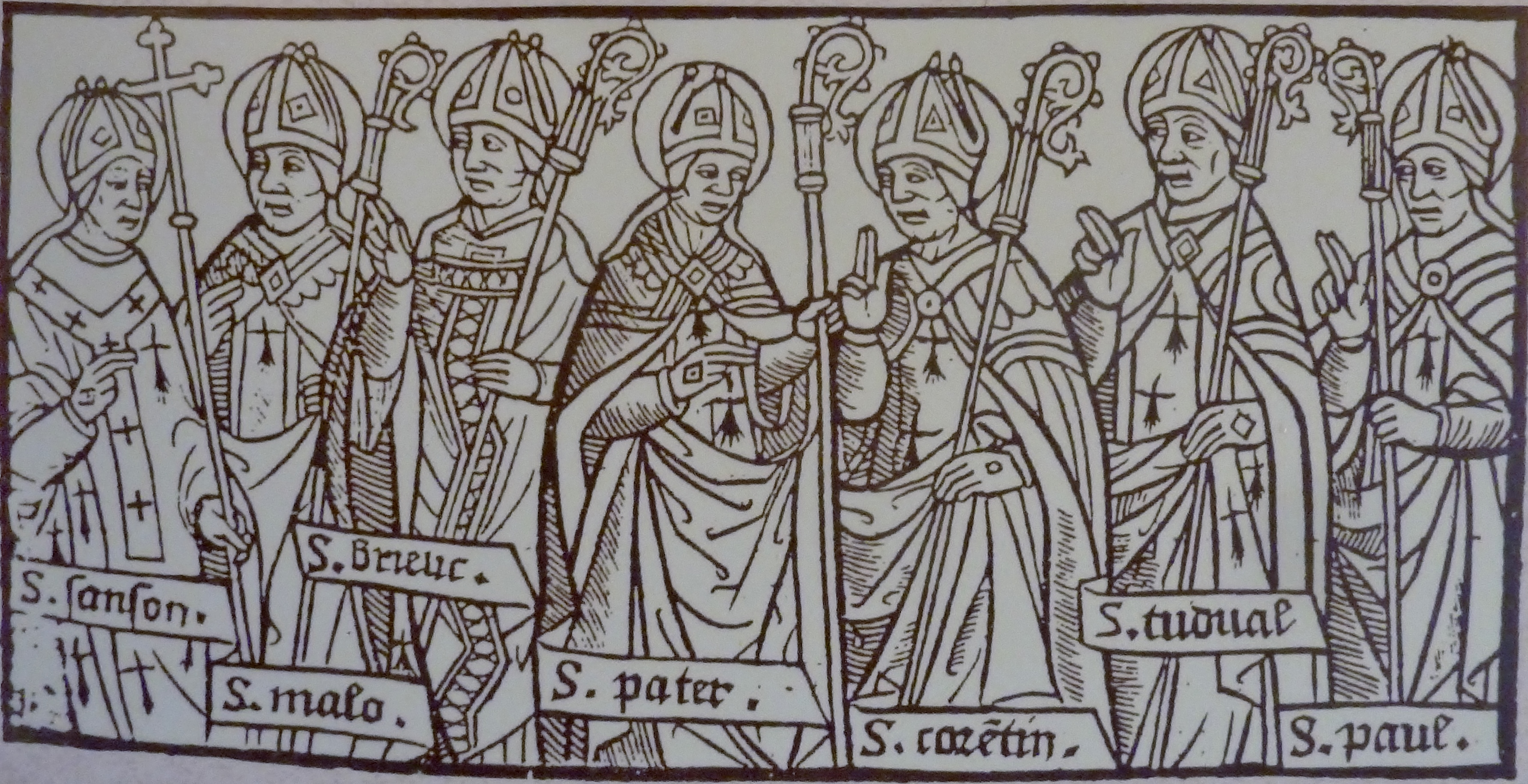 Les sept saints fondateurs bretons (gravure sur bois de 1514, auteur anonyme)